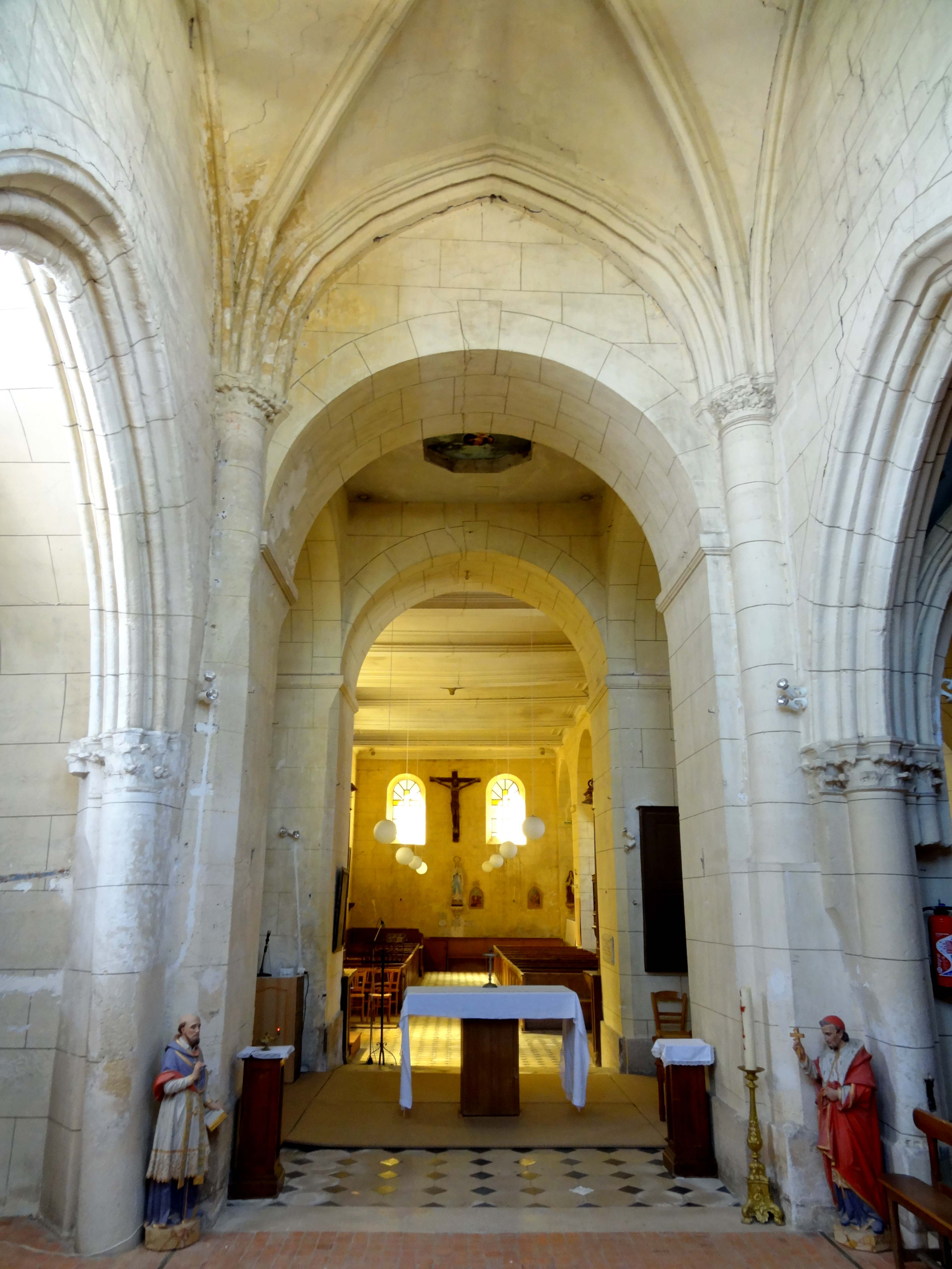 Intérieur de l'église - voir titre.